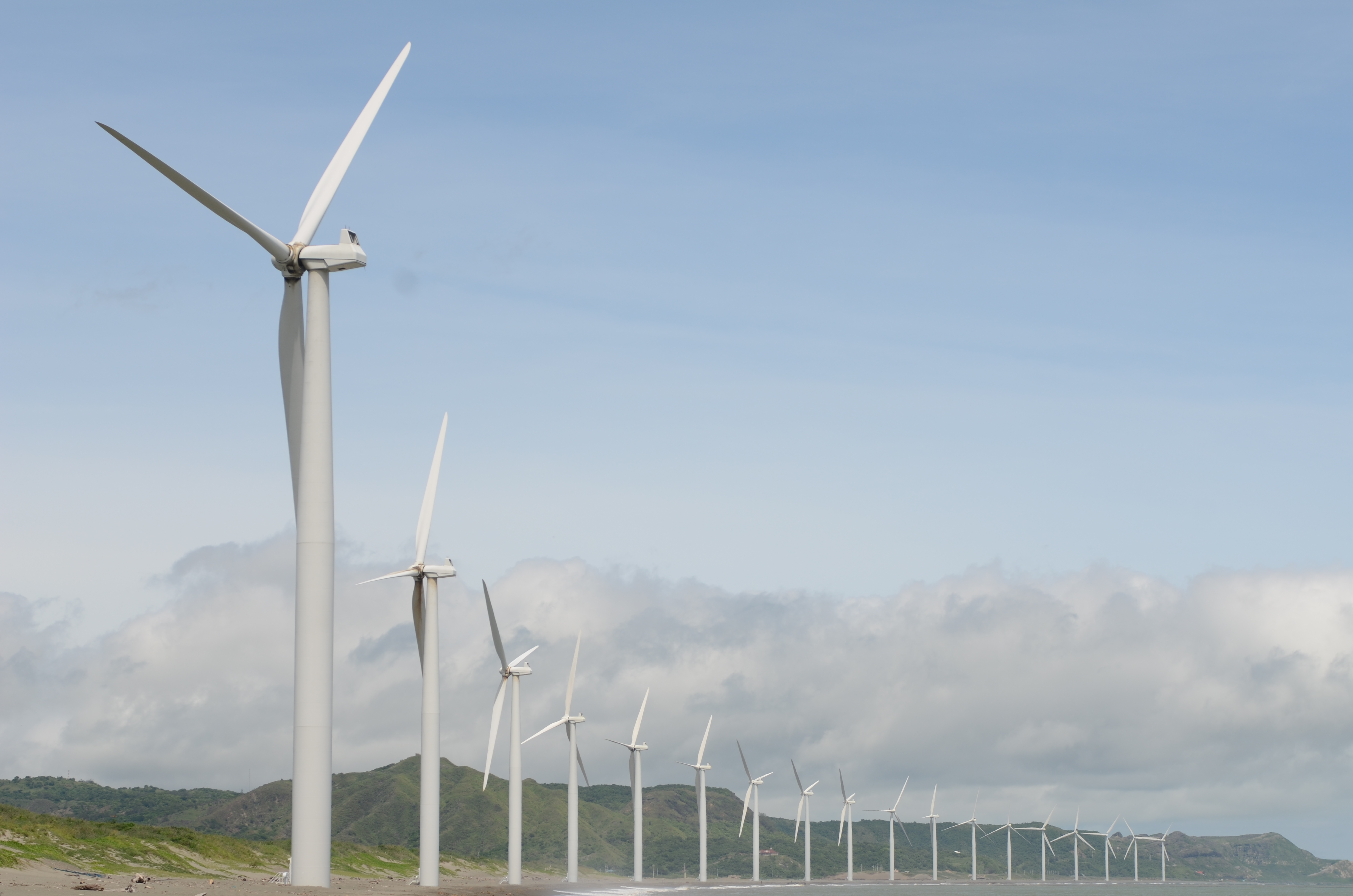 Bangui Wind Mills